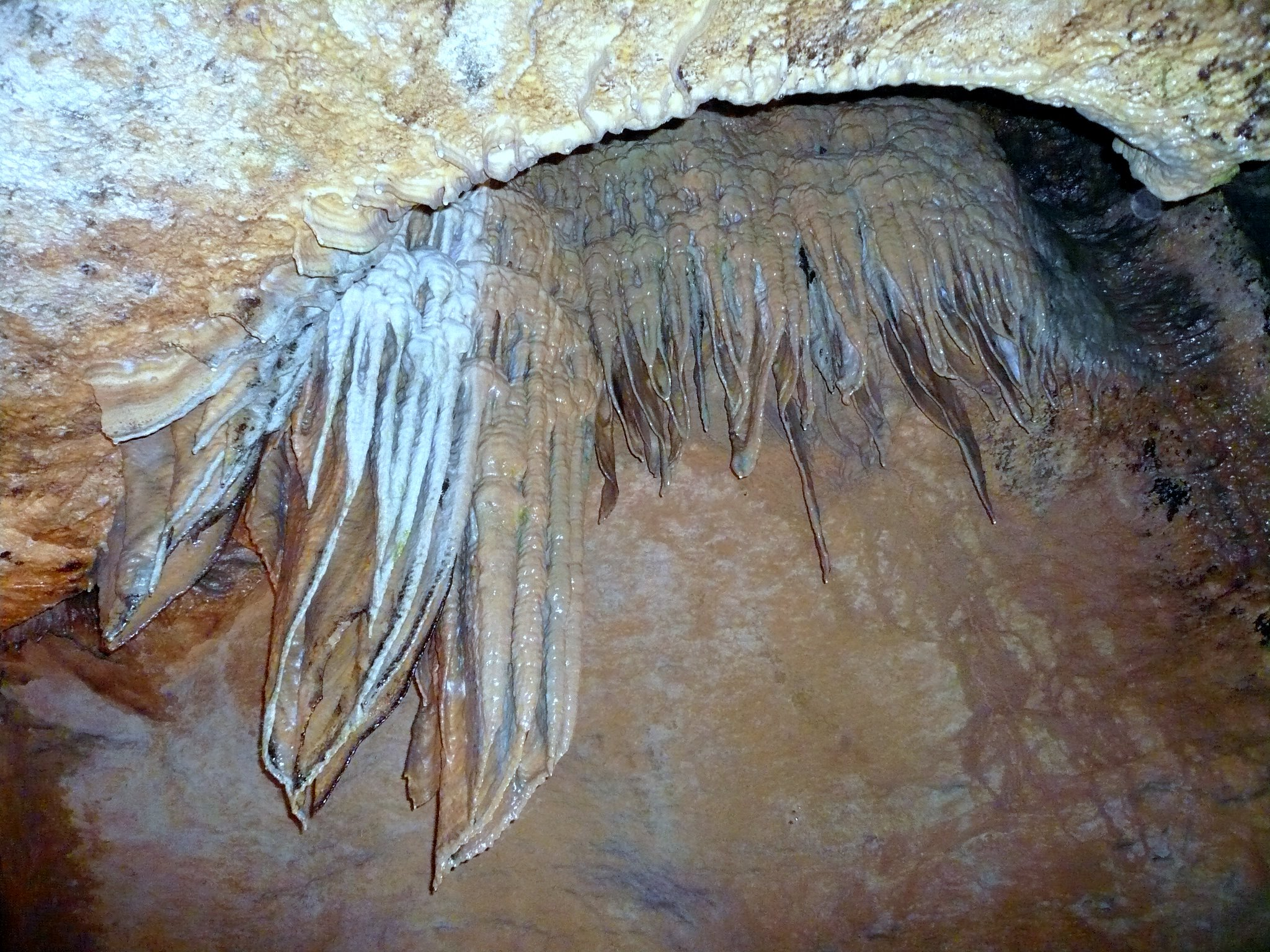 Sophienhöhle, Sinterfahne